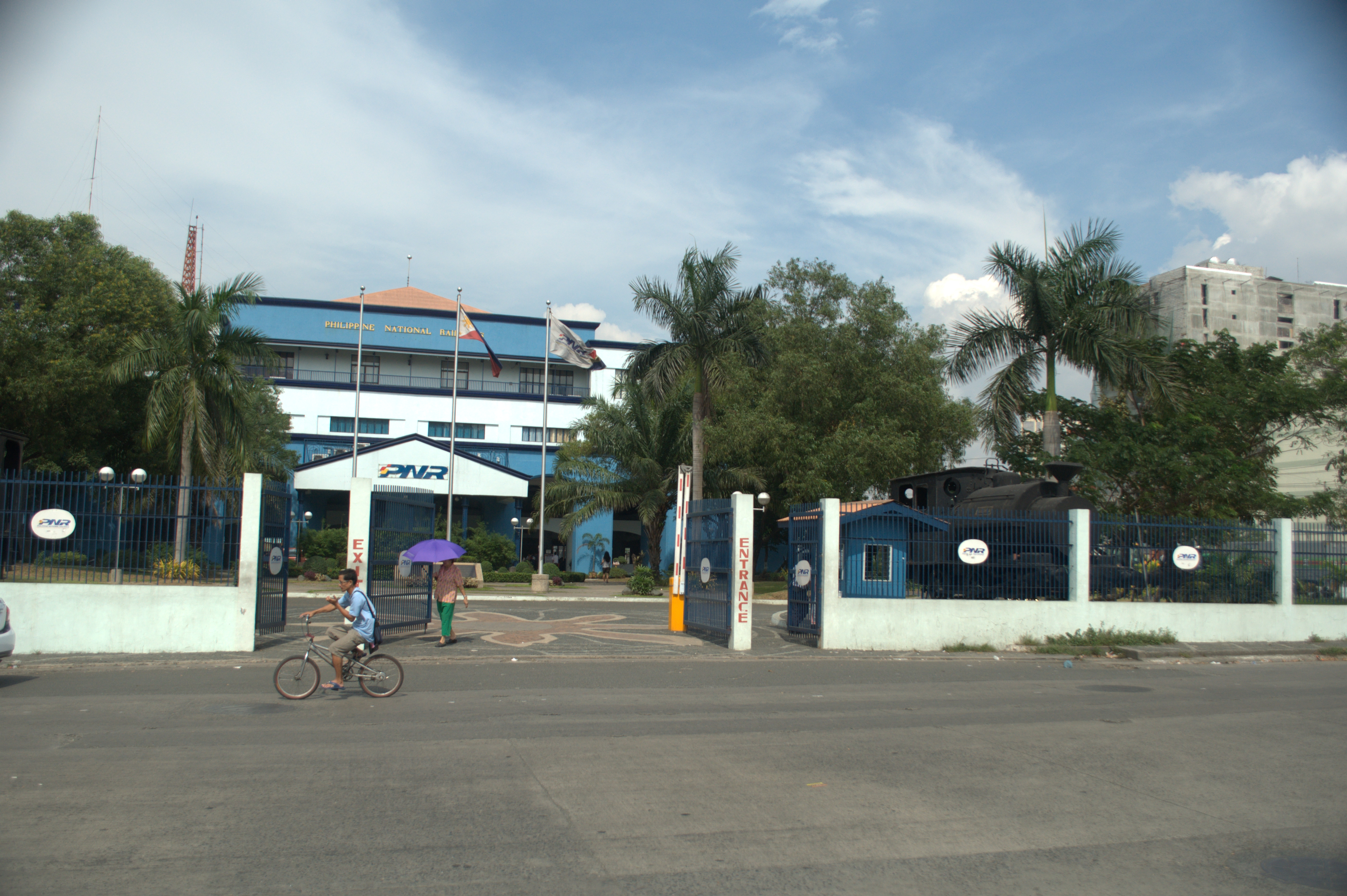 Tutuban railway station in Manila, Philippines